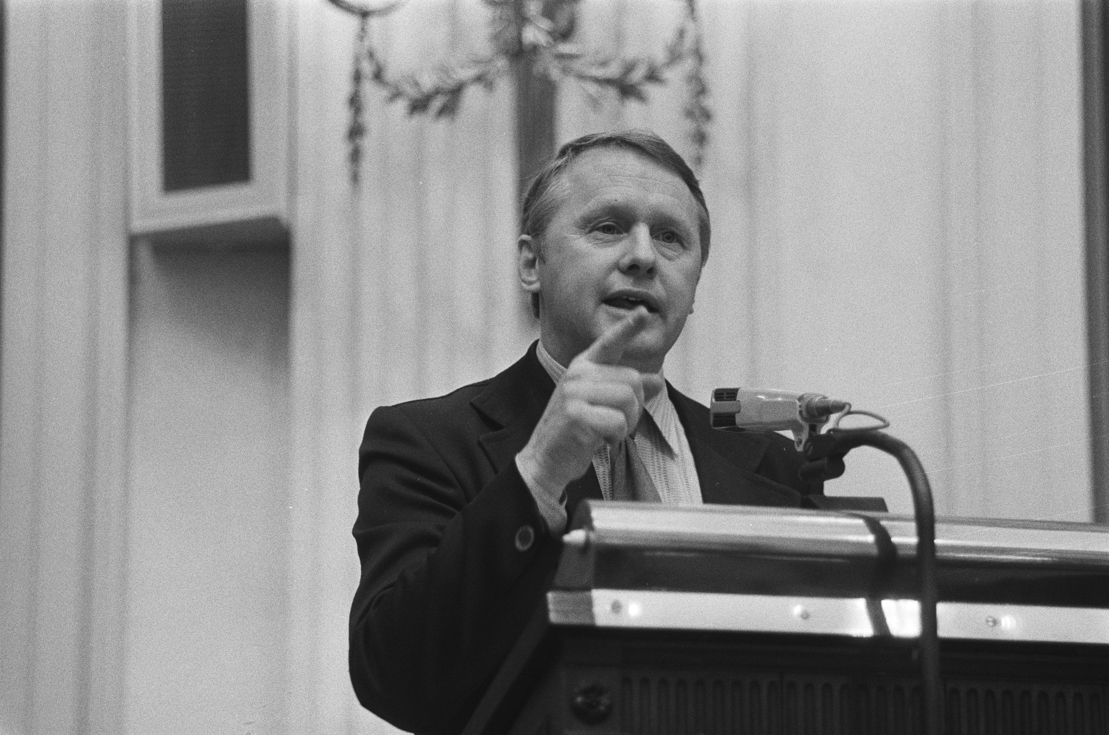 Collectie / Archief : Fotocollectie Anefo Reportage / Serie : Tweede Kamer behandelt Integraal Structuurplan Noorden des Lands Beschrijving : PvdA woordvoerder Spieker Datum : 26 maart 1980 Locatie : Den Haag, Zuid-Holland Trefwoorden : parlementaire debatten, politiek, portretten Persoonsnaam : Spieker, Bonno Instellingsnaam : PvdA, Tweede Kamer Fotograaf : Bogaerts, Rob / Anefo Auteursrechthebbende : Nationaal Archief Materiaalsoort : Negatief (zwart/wit) Nummer archiefinventaris : bekijk toegang 2.24.01.05 Bestanddeelnummer : 930-7439